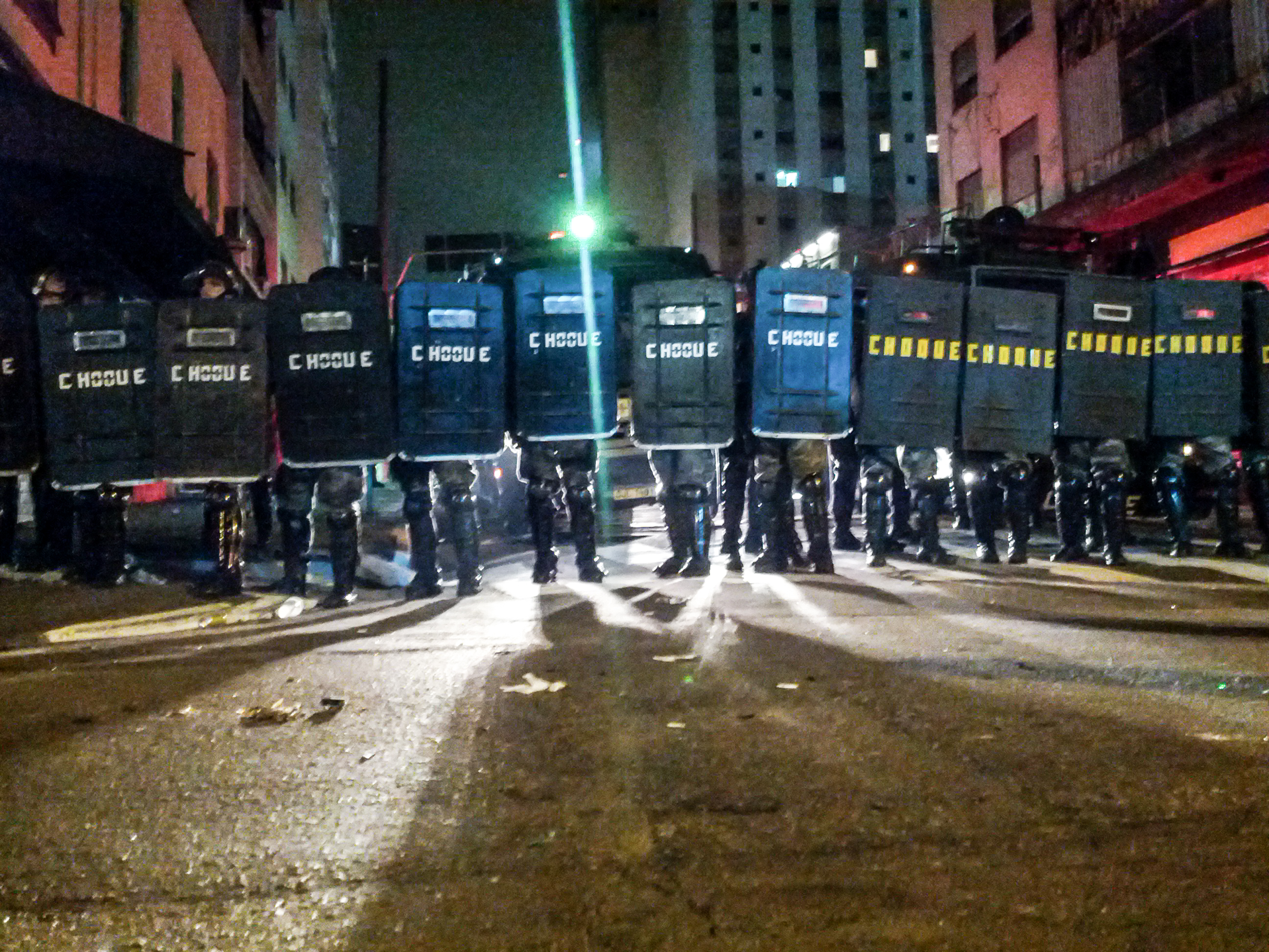 Tropa de choque criando um bloqueio na Augusta.